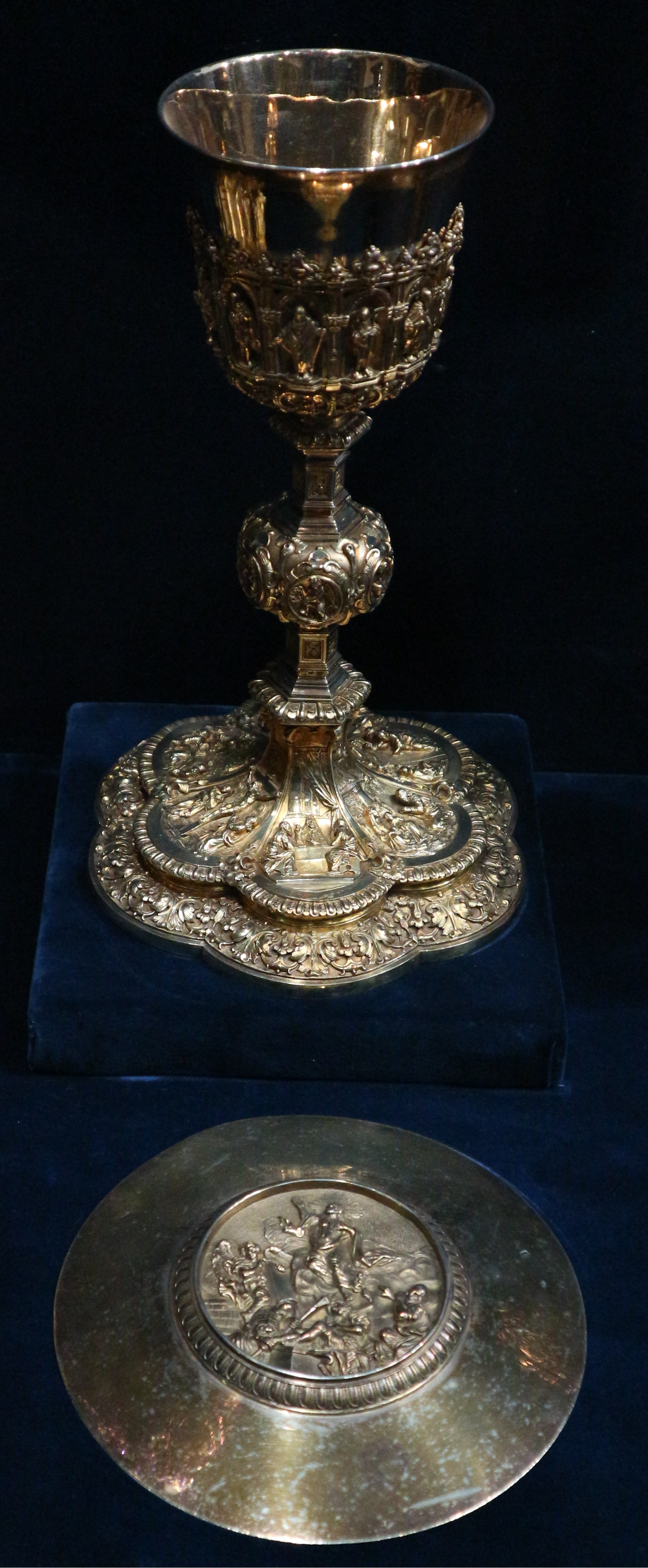 Argent, la résurection (sur la patène) Cathédrale Saint-Jean Baptiste André Favier